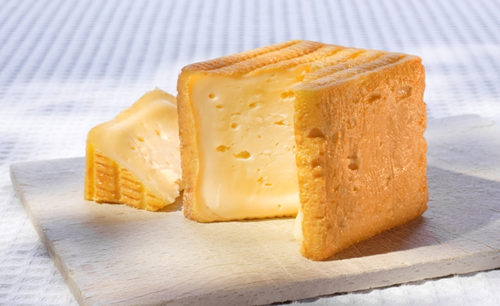 Fromage à pâte molle et à croûte lavée, d’Appellation d’Origine Protégée (AOP).